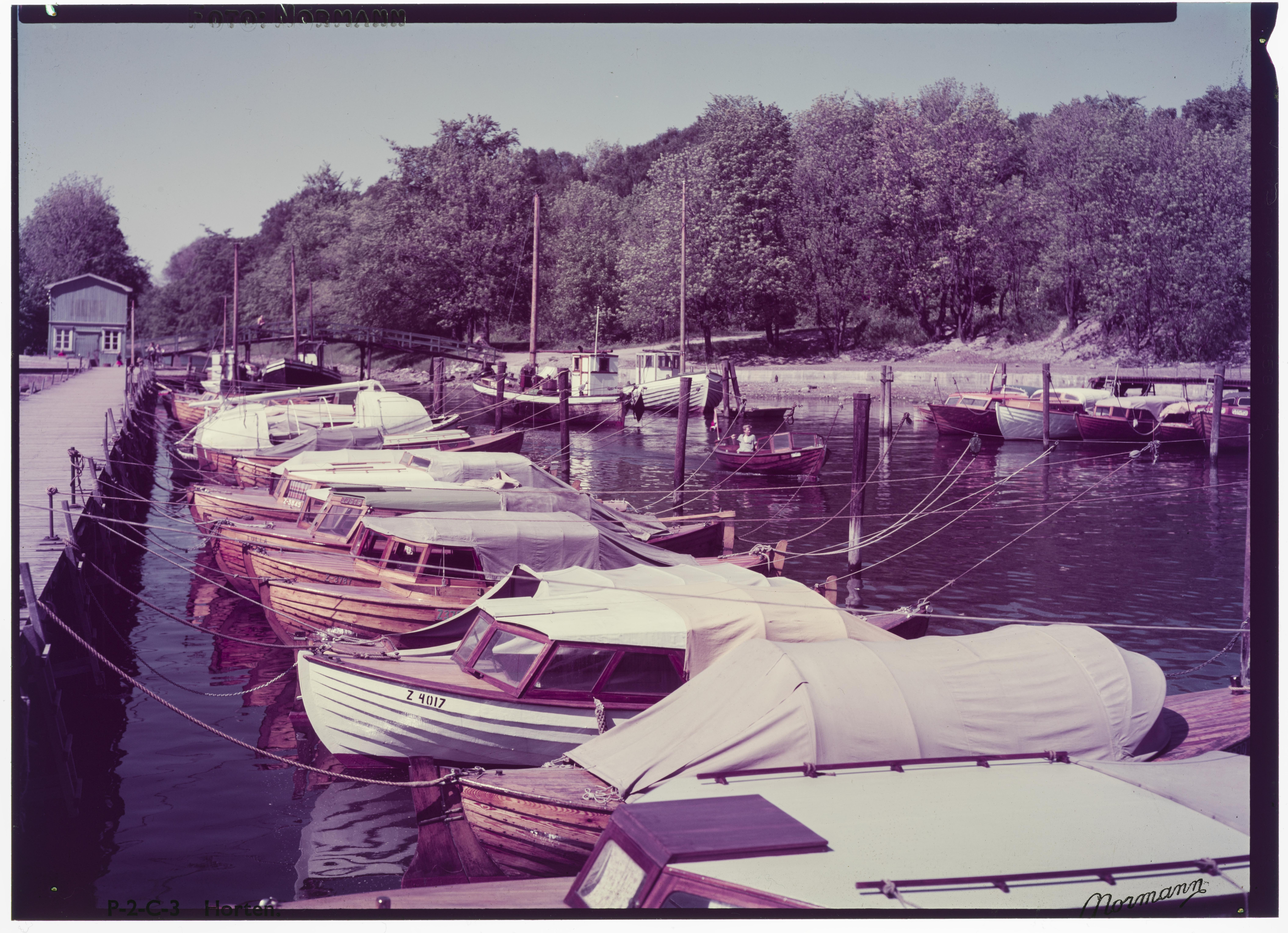 Bildet er hentet fra Nasjonalbibliotekets bildesamling. Anmerkninger til bildet var: Tittel er hentet fra emballasje. Horten, Horten, Vestfold